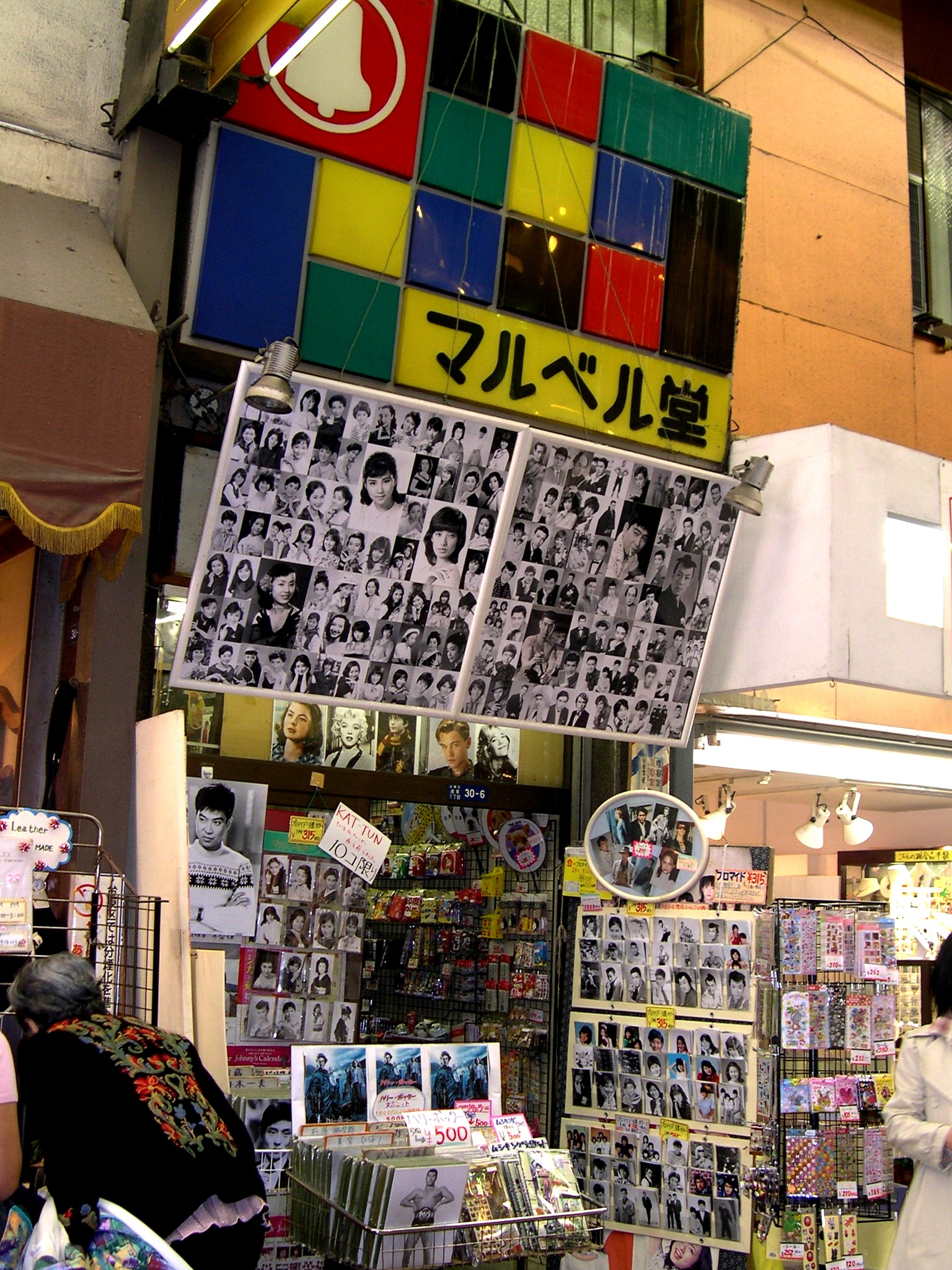 プロマイドのマルベル堂 新仲見世店 東京都台東区浅草 1-30-6